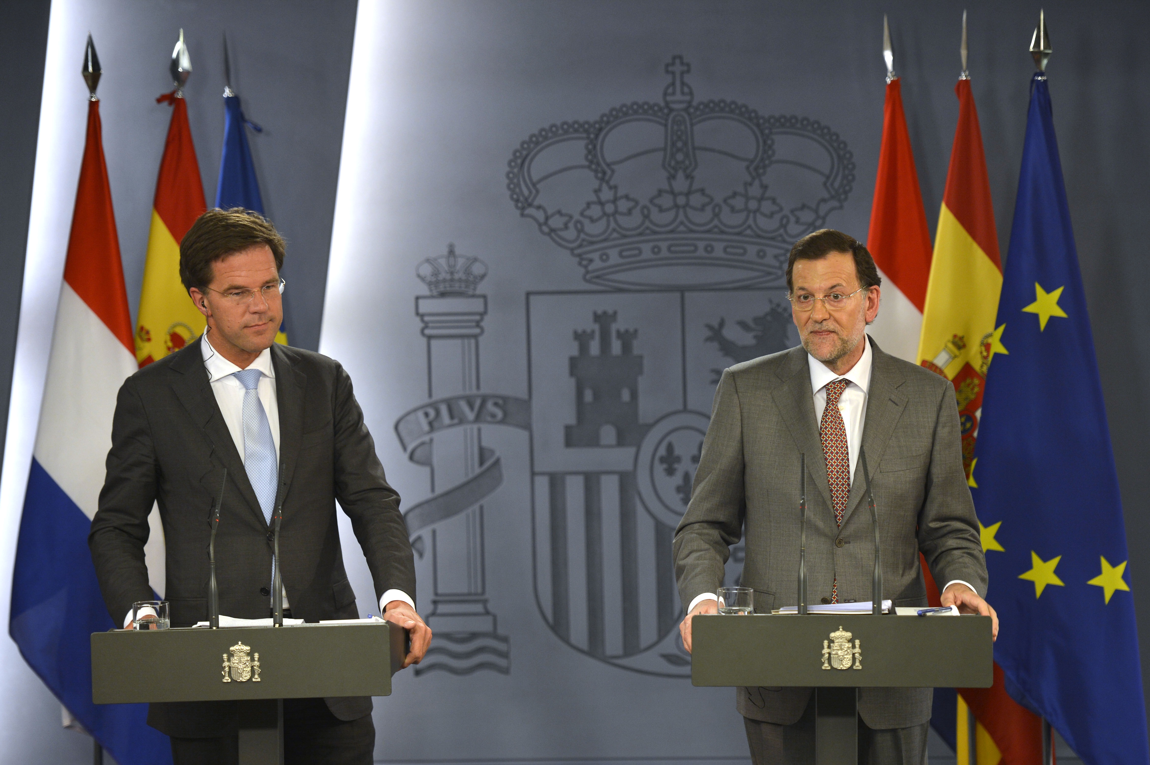 Minister-president Rutte en de Spaanse minister-president Rajoy staan na afloop van hun gesprek de pers te woord.